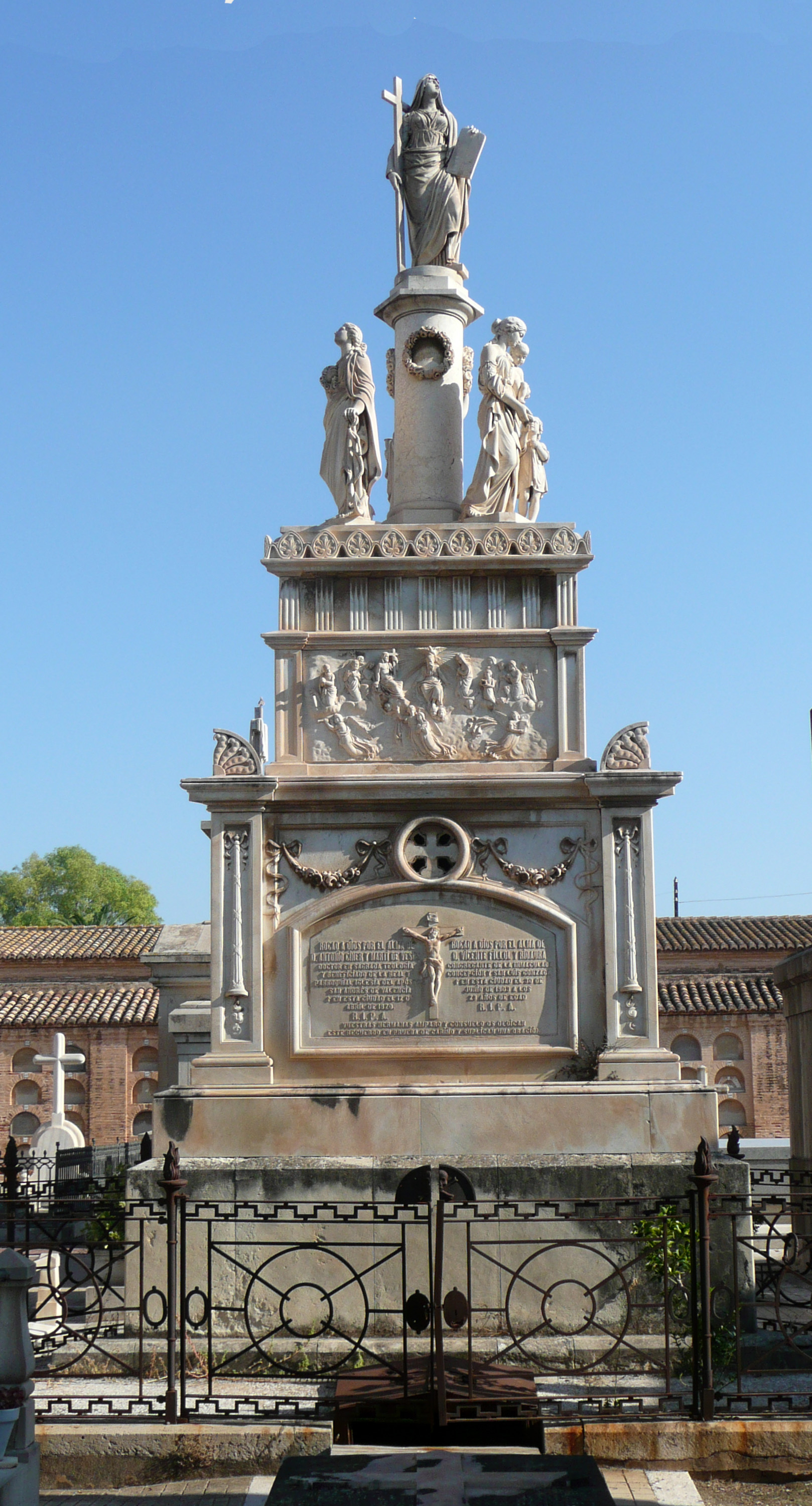 Panteón de Pascual María Estruch. Cemeterio de Valencia[1]